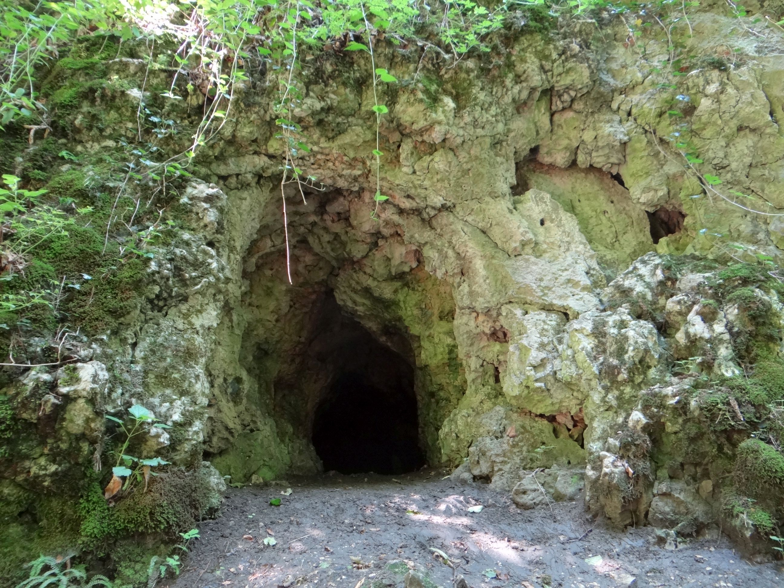 Jaskinia przy Kamyku (Jaskinia Pańskie Kąty) w Nielepicach